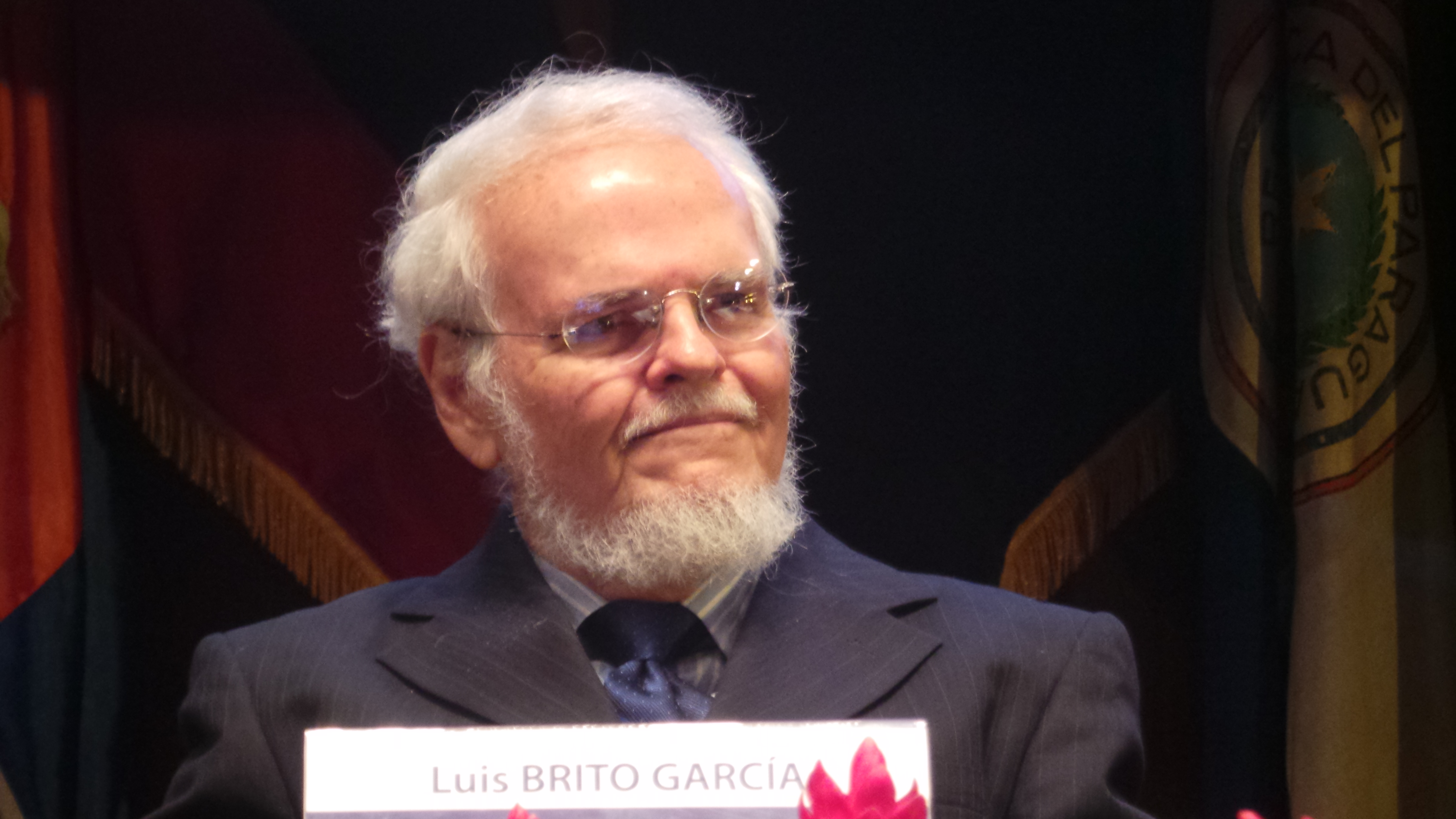 Escritor, ensayista e historiador. Intervención en CIESPAL Ecuador. Congreso sobre Comunicación e integración latinoamericana del Sur y para el Sur.